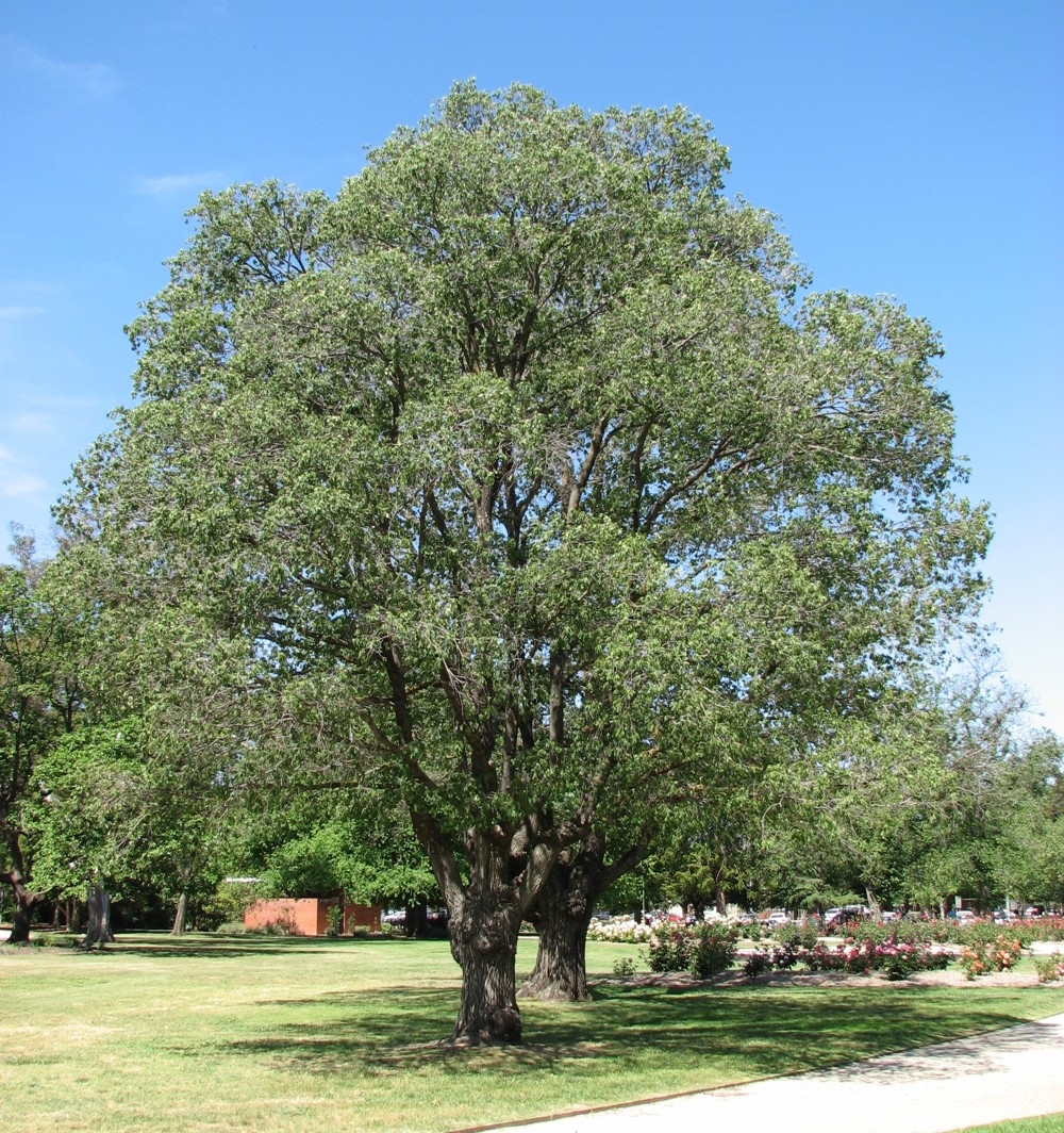 Ulmus x viminalis in Benalla Botanic Gardens, Victoria, Australia.